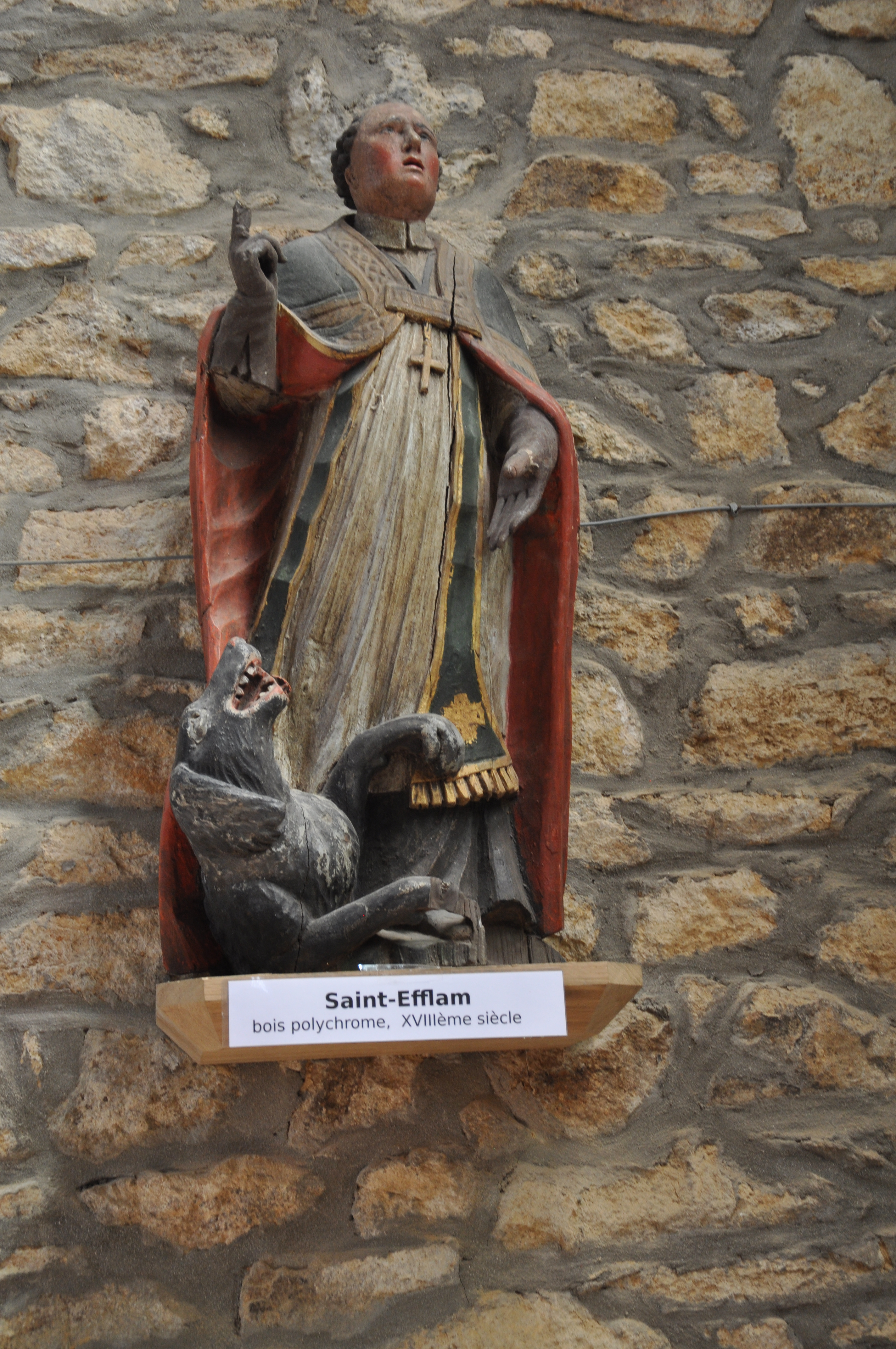 Eglise de Carnoët (22, Côtes d'Armor). Statue de,Saint Efflam, saint breton. Bois polychrome, XVIIIème.